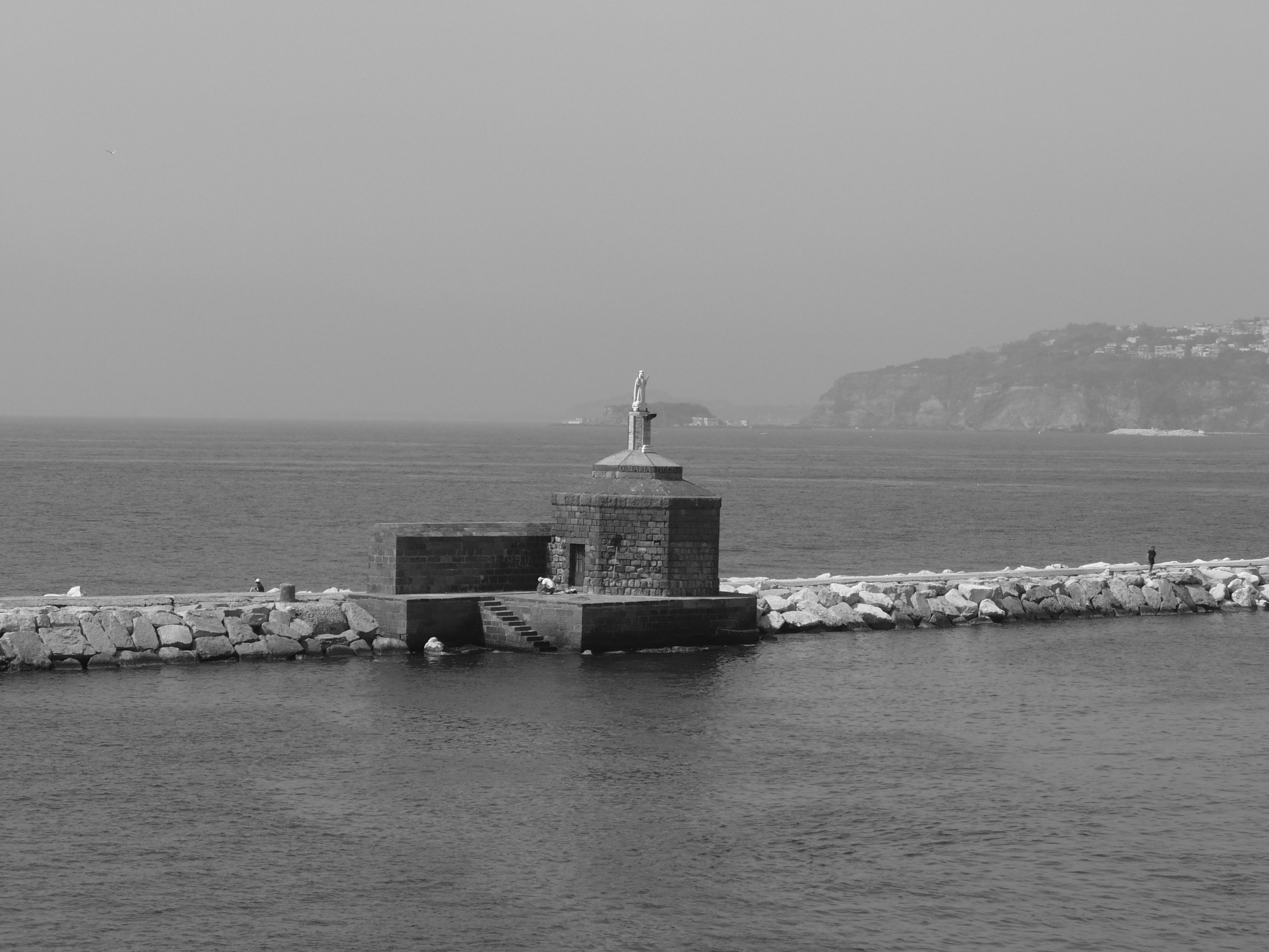 Statua della Vergine collocata all'estremità del porto di Procida allo scopo di salutare e benedire le imbarcazioni che prendono il mare. Sullo sfondo il Monte di Procida e collegato a questo l'isolotto di San Martino Autore foto: Roberto De Martino